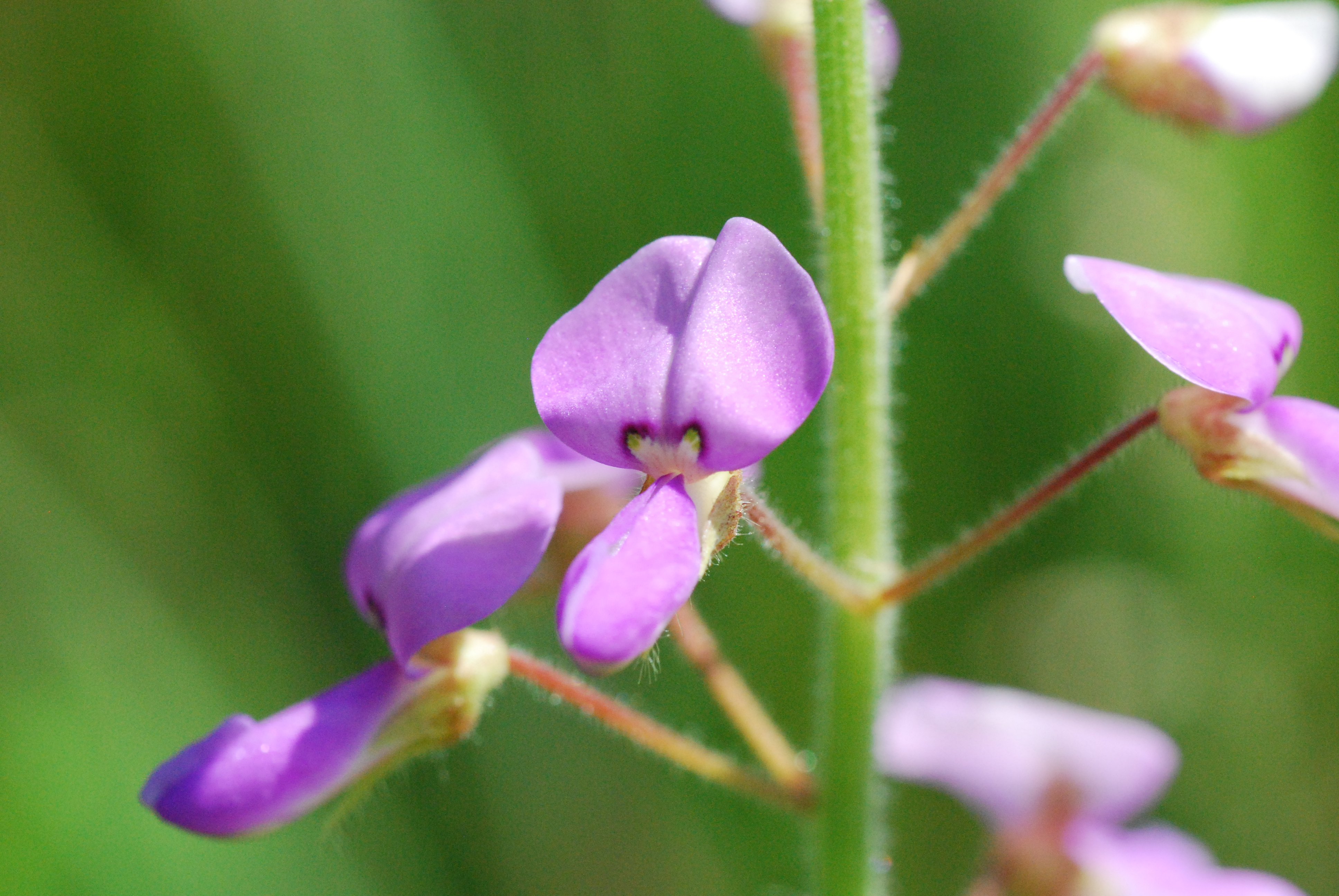 Illinois tick-trefoil, Desmodium Illinoense